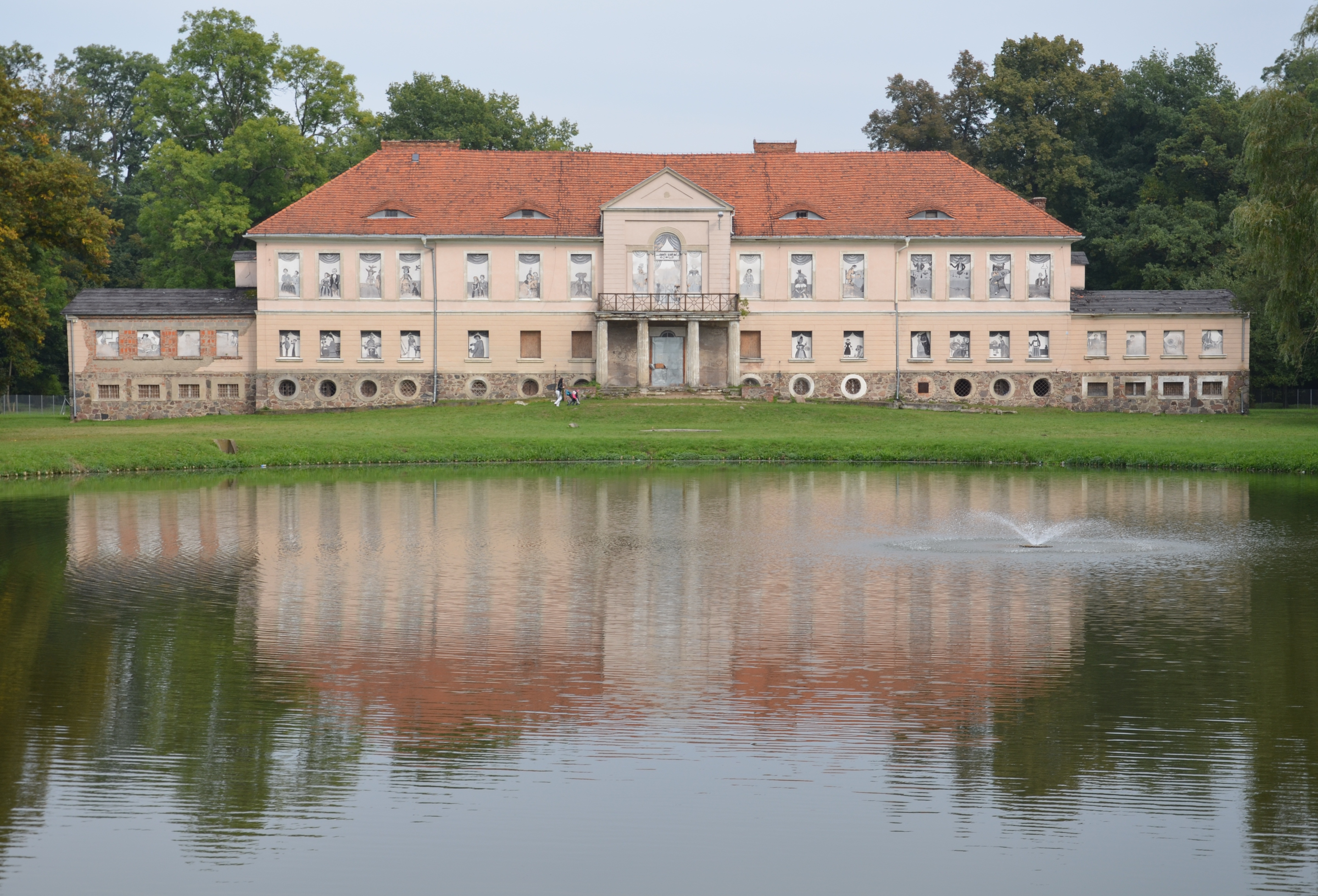 Owińska, pałac, 1805